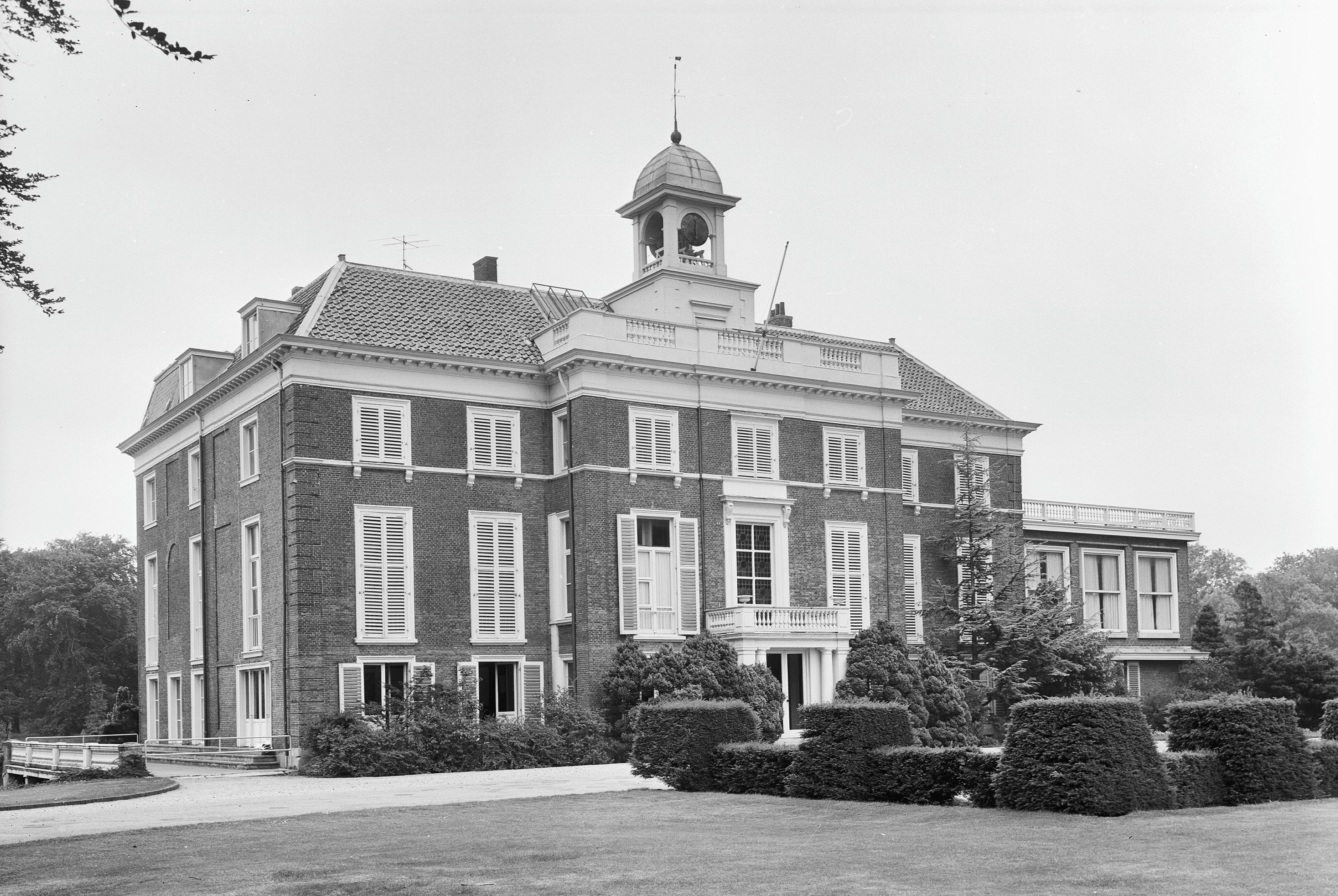 voorgevel